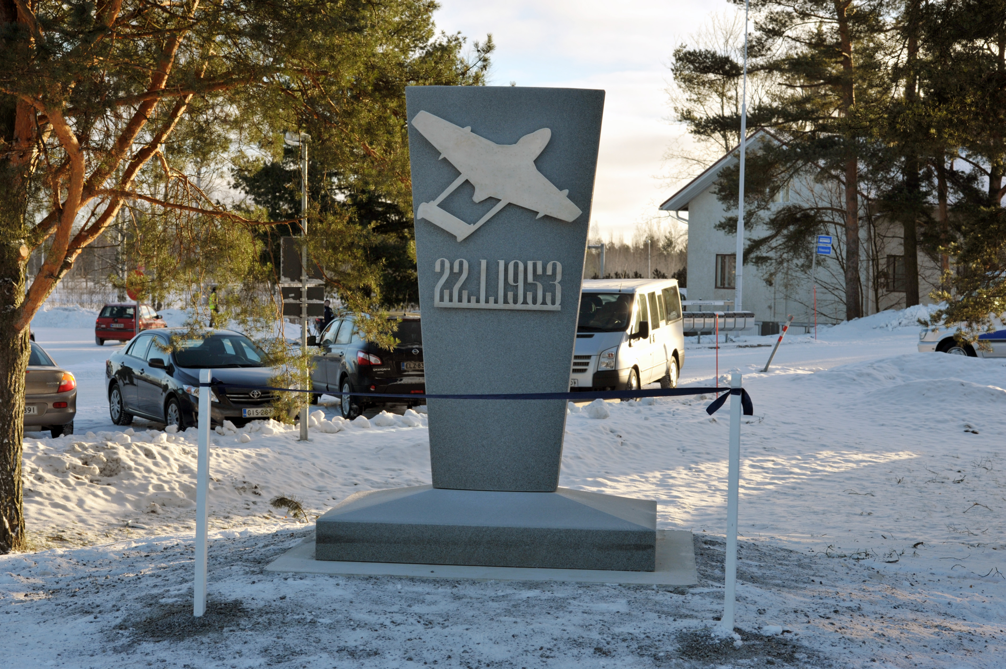 Suomen suihkulentokauden alkamisen muistomerkki Porin lentoasemalla. Ensimmäiset Vampire suihkuhävittäjät laskeutuivat Poriin 22.1.1953.